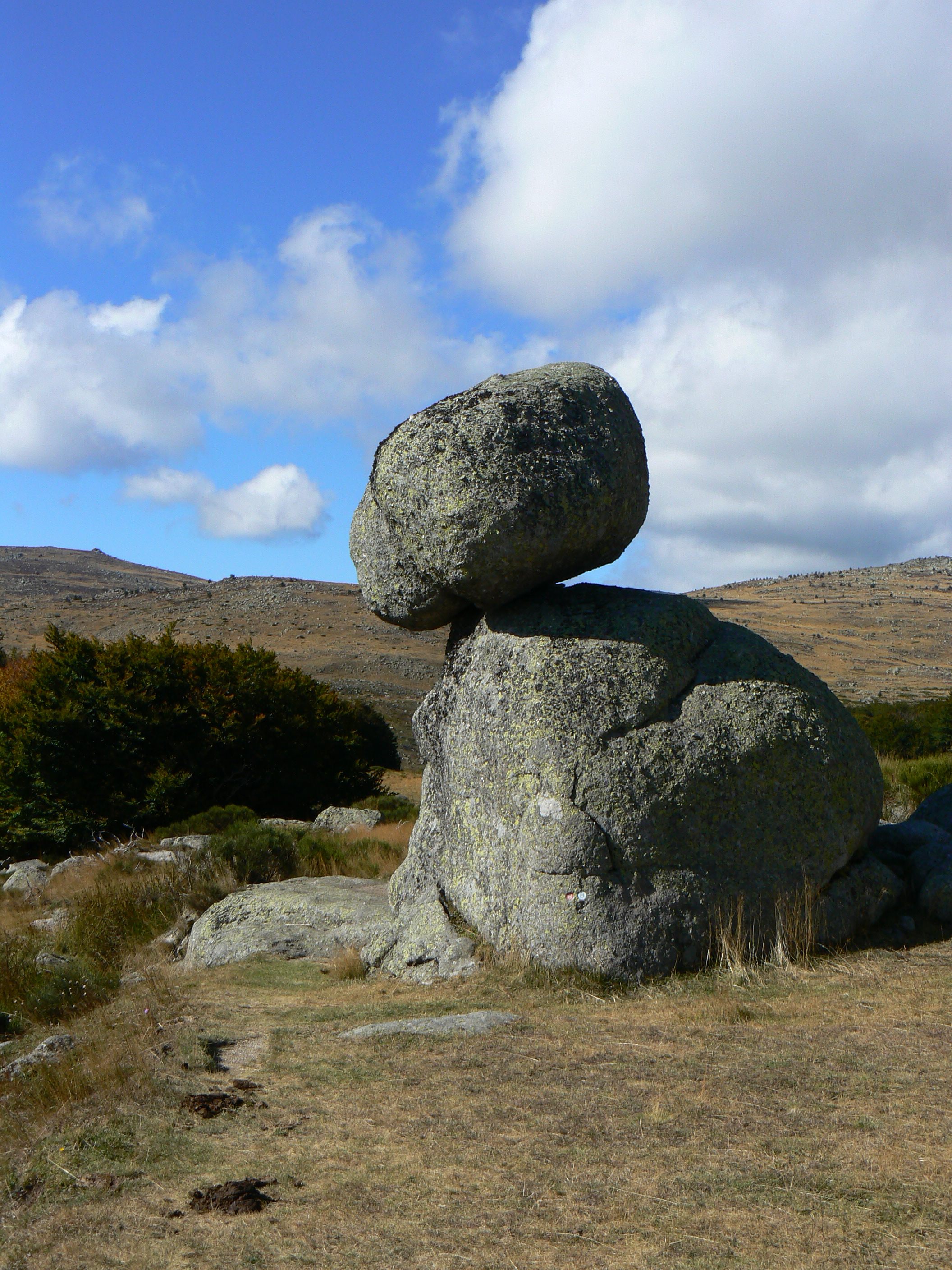 Chaos rocheux sur le mont Lozère dans le parc national des Cévennes, près du Mas Camargues en Lozère (France)